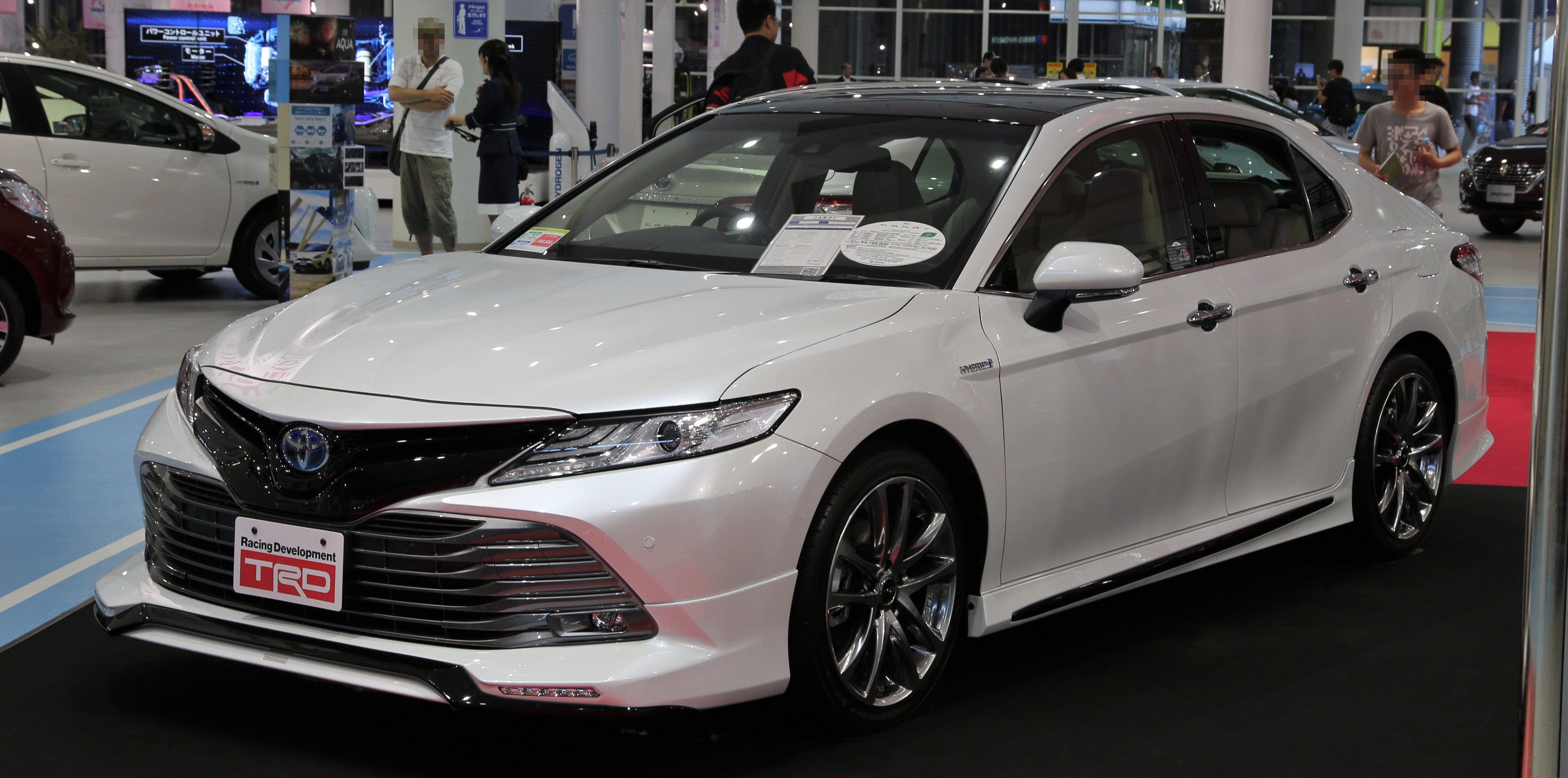 Toyota XV70